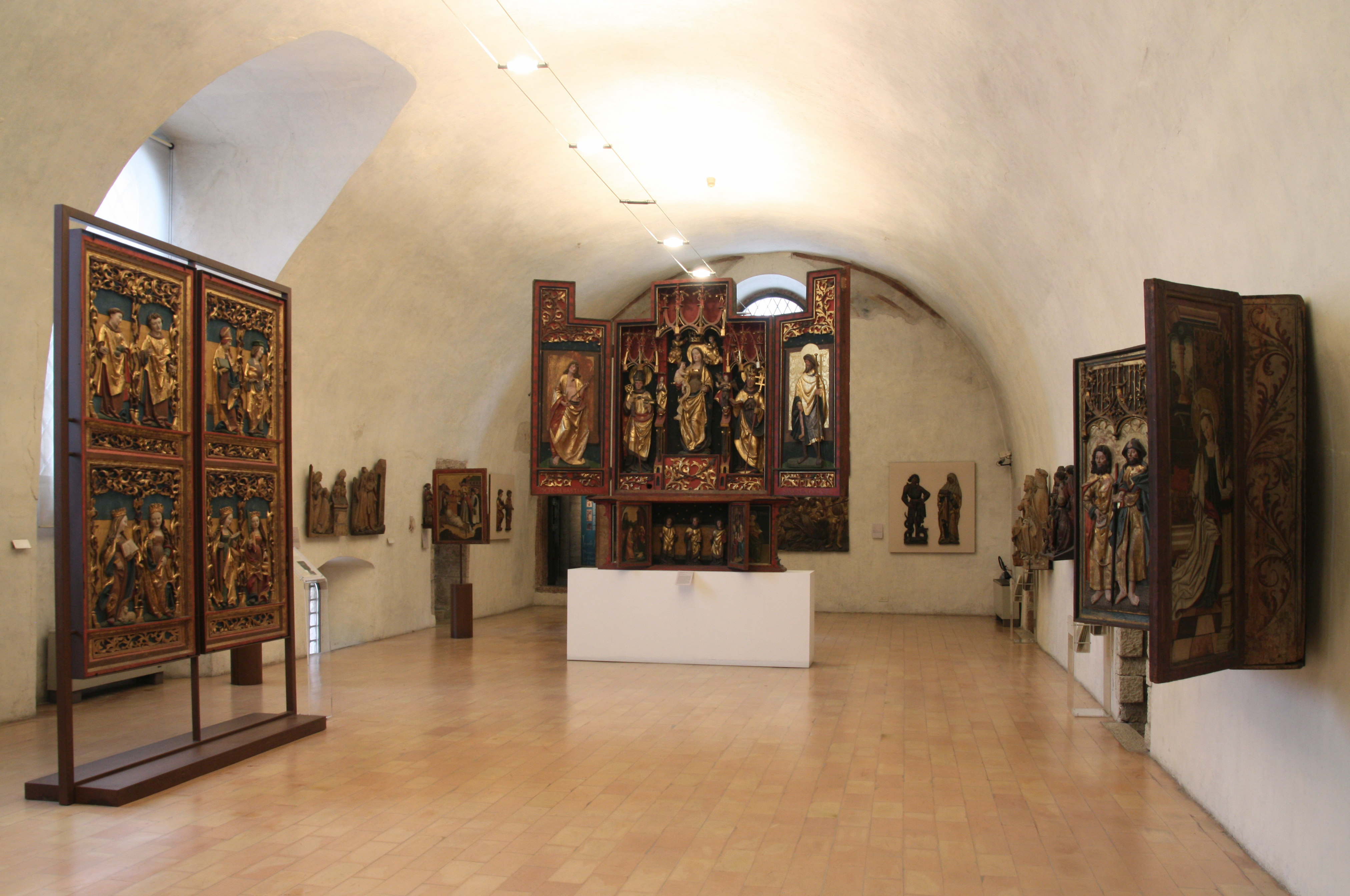 La Cappella Palatina all'interno del Palazzo Pretorio, un tempo cappella privata del Vescovo, ora sala espositiva del Museo Diocesano Tridentino.